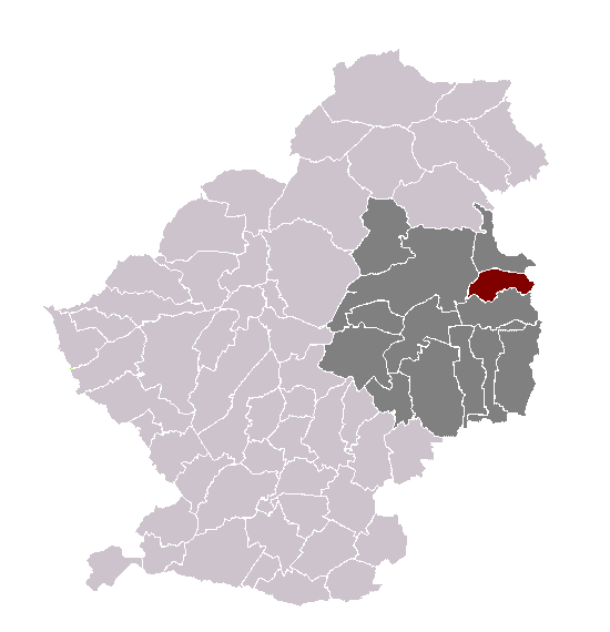 Warlaing dans son canton et son arrondissement